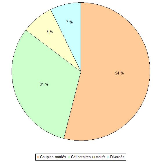 Composition de la population de Couzon (Allier, France) en 2007.